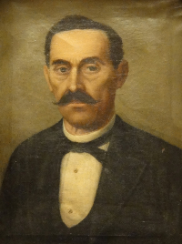 Self-portrait